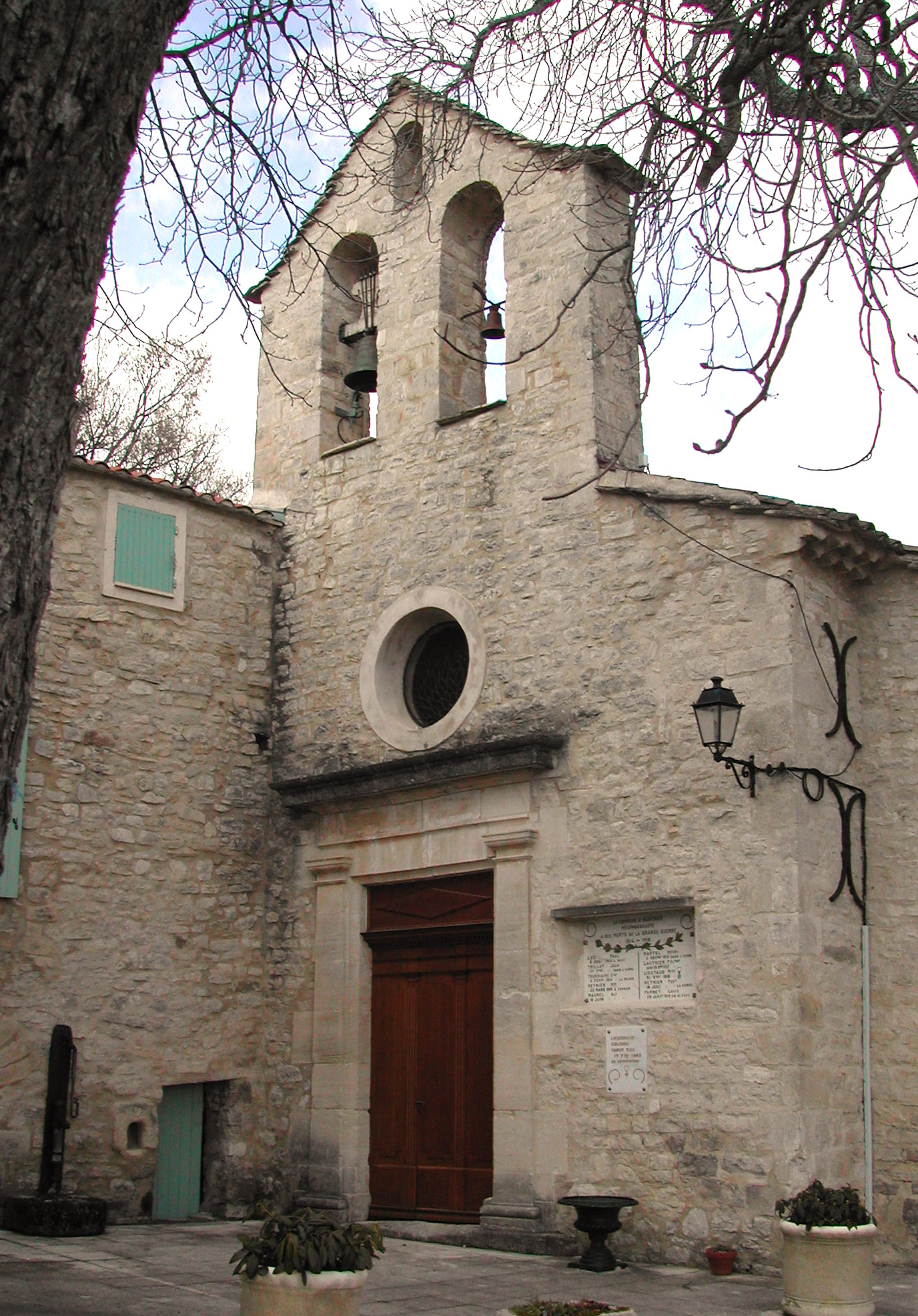 L'église d'Aubenas les Alpes